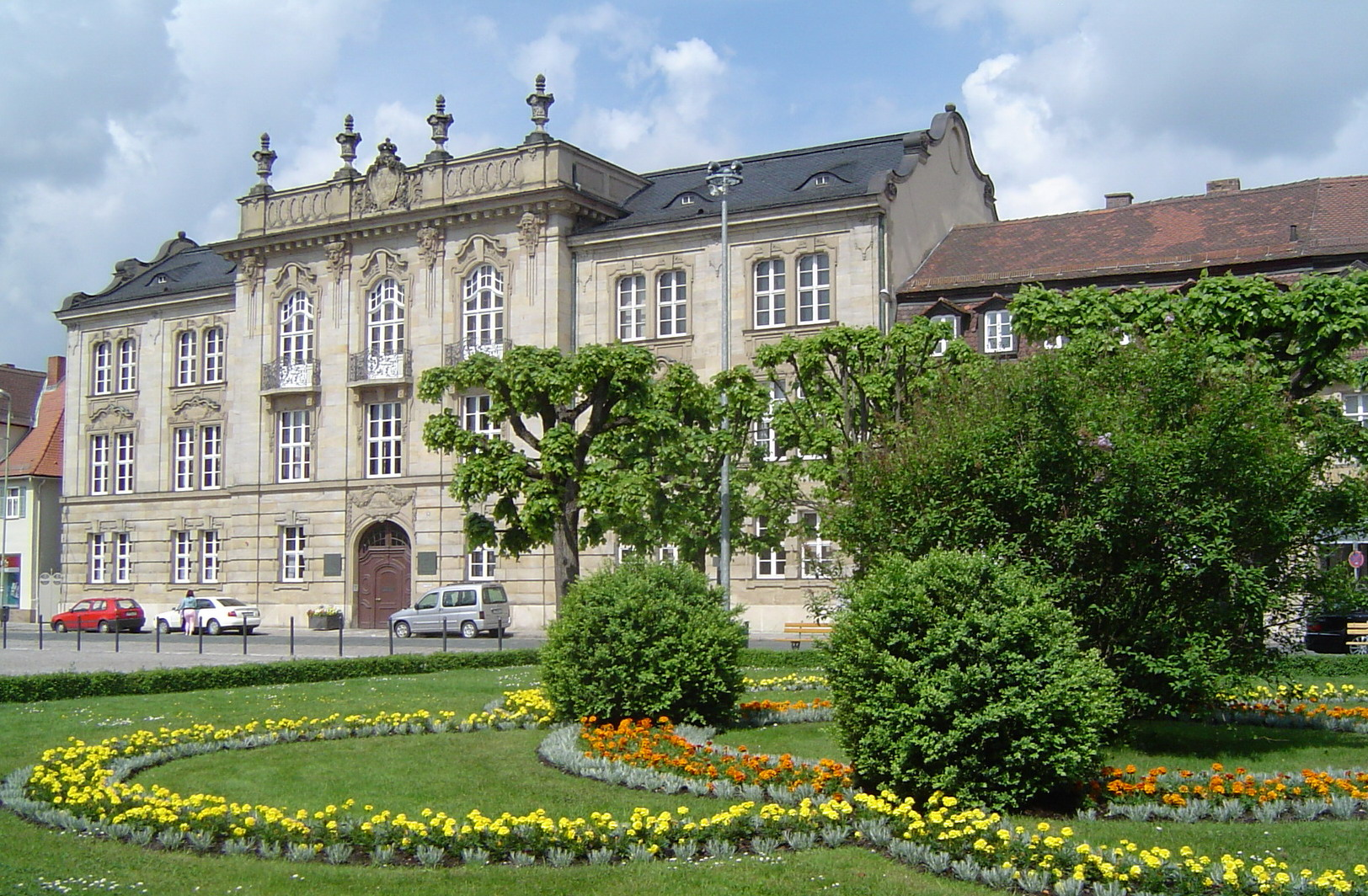 Bayreuth, Ludwigstraße 20, Regierungsgebäude von Oberfranken